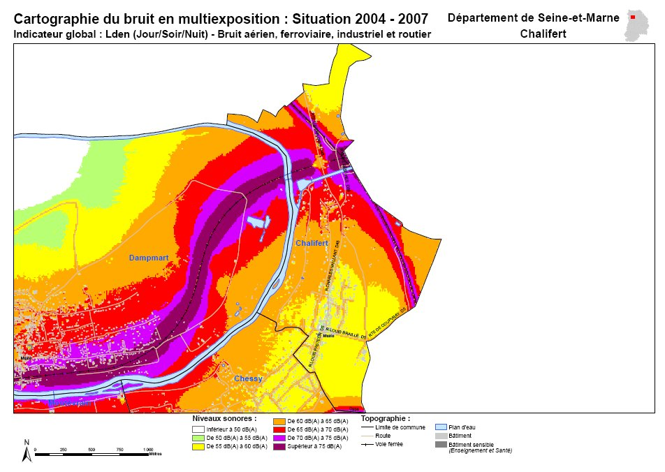 Carte de bruits multi-expositions